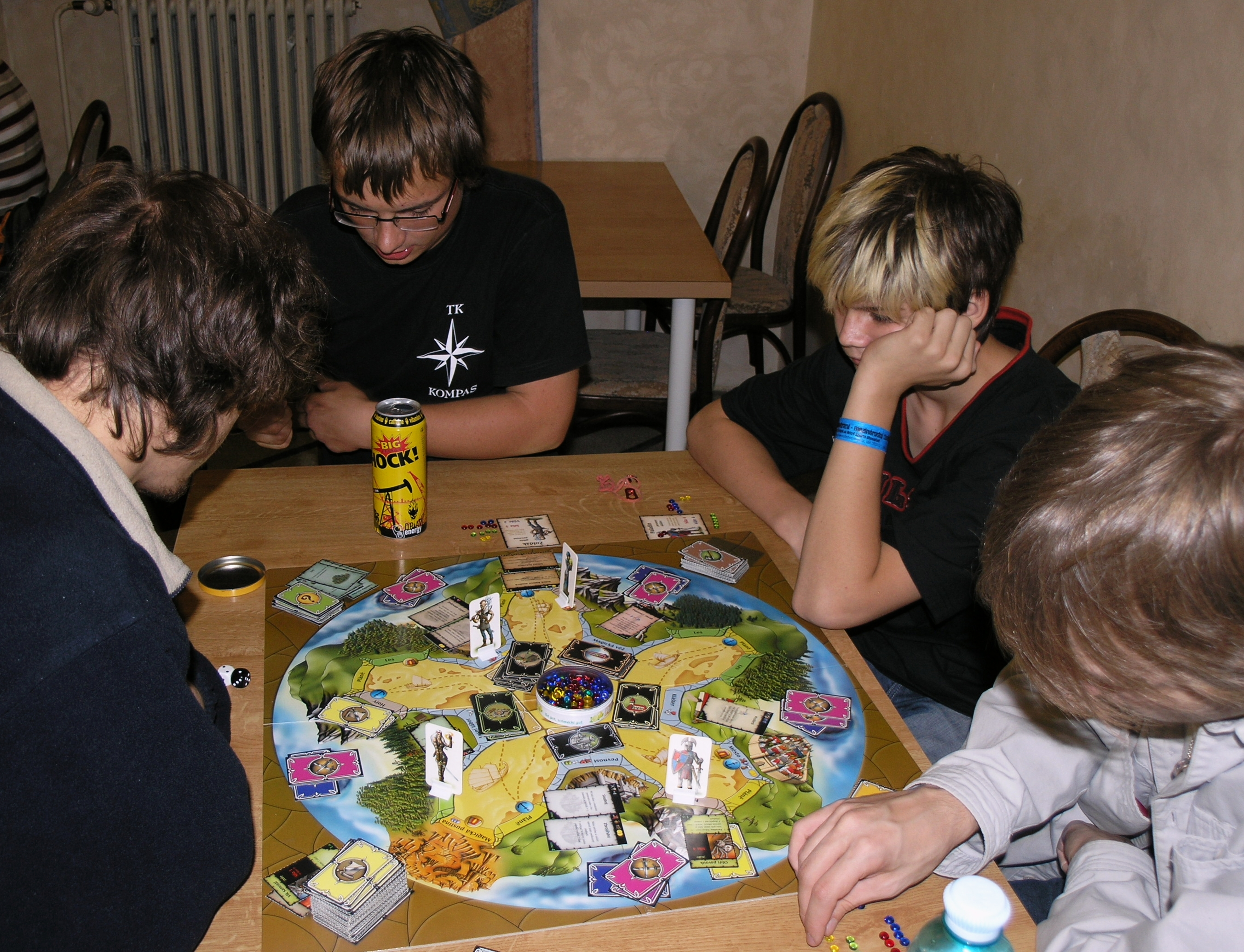 Deskohraní 2008